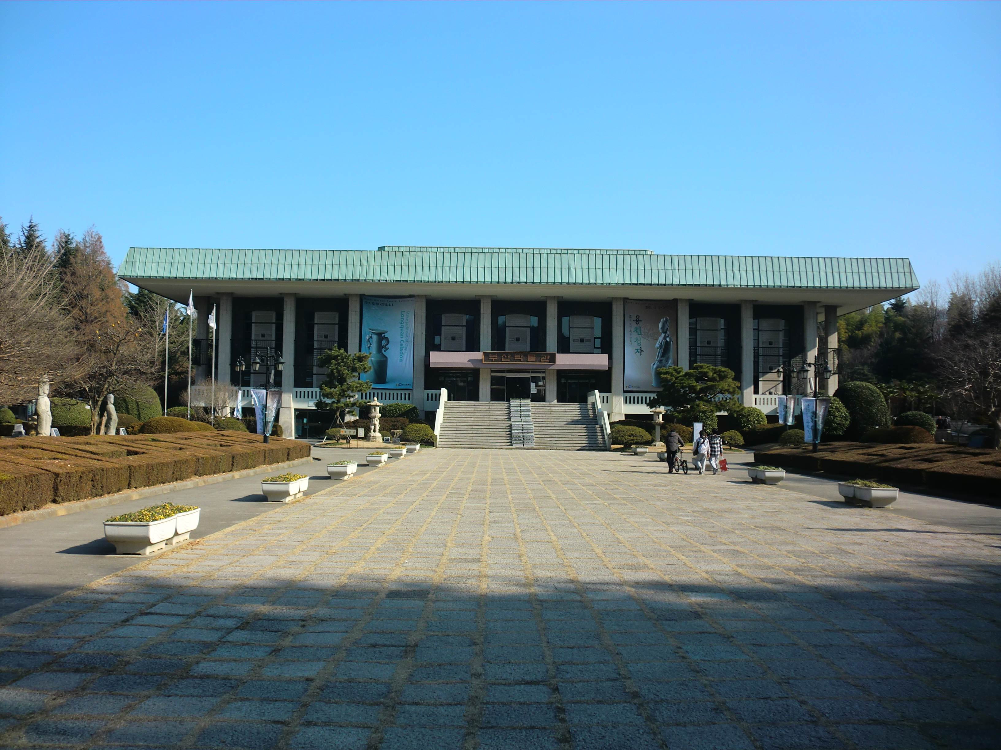 부산광역시 남구에 있는 부산박물관